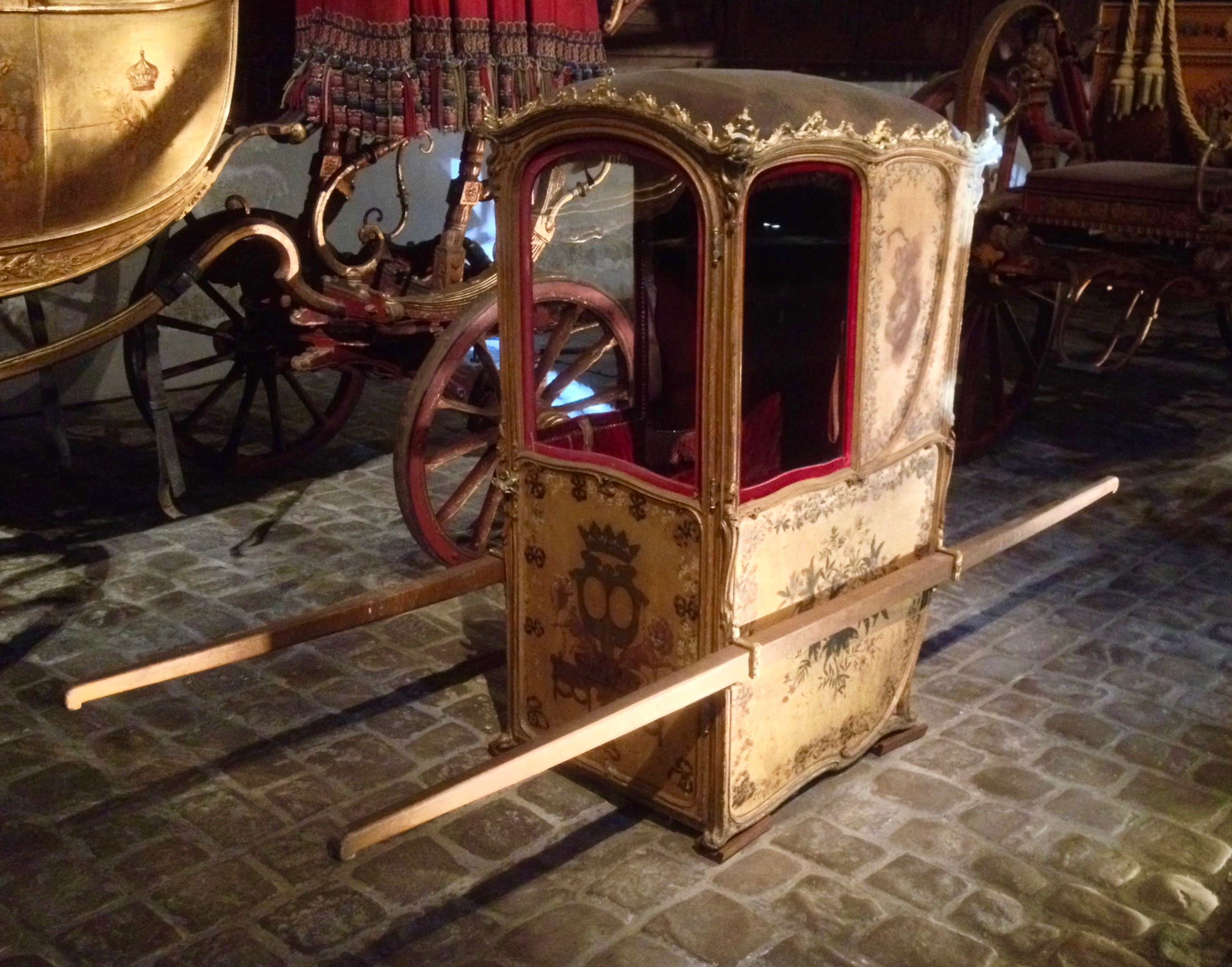 une Chaise à porteur 1750-65